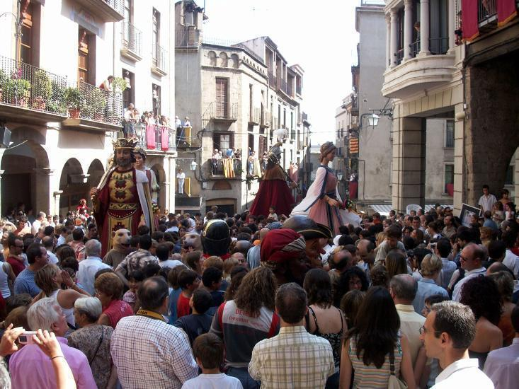 Multitud de gent amb els gegants de Solsona durant la Festa Major.